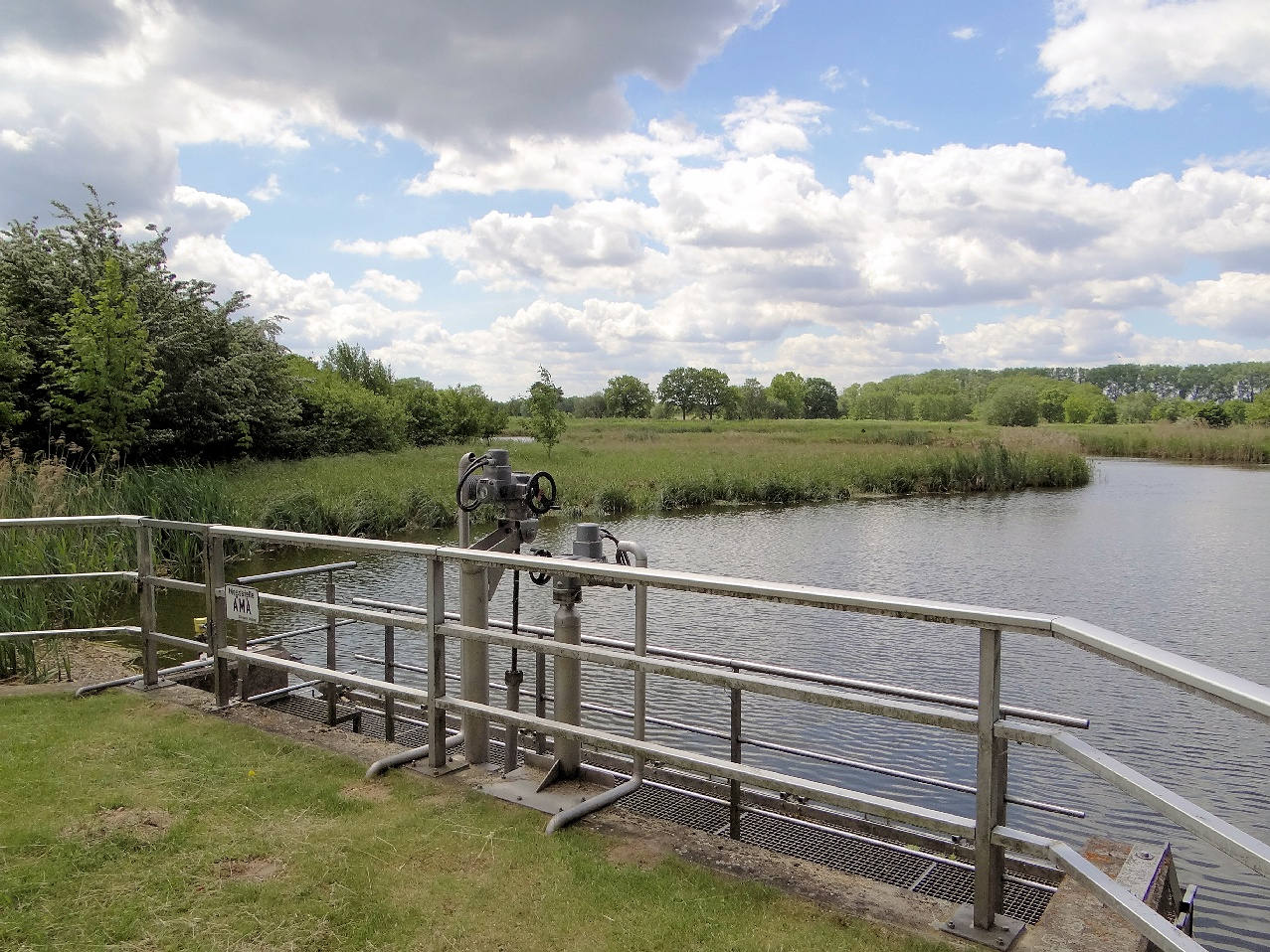 Auslaufbauwerk mit Regelorganen für einen bereich der schönungsteiche in den Rieselfeldern.